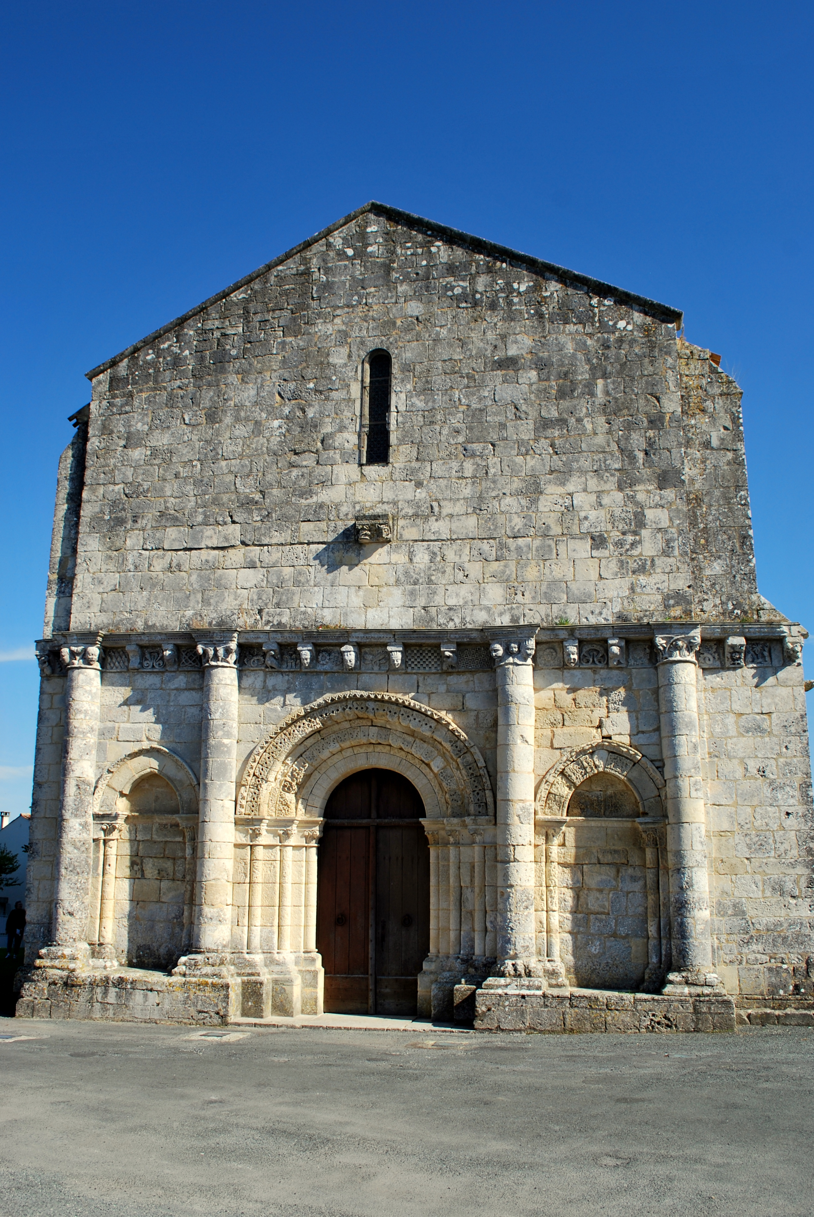 Église Saint-Trojan de Rétaud